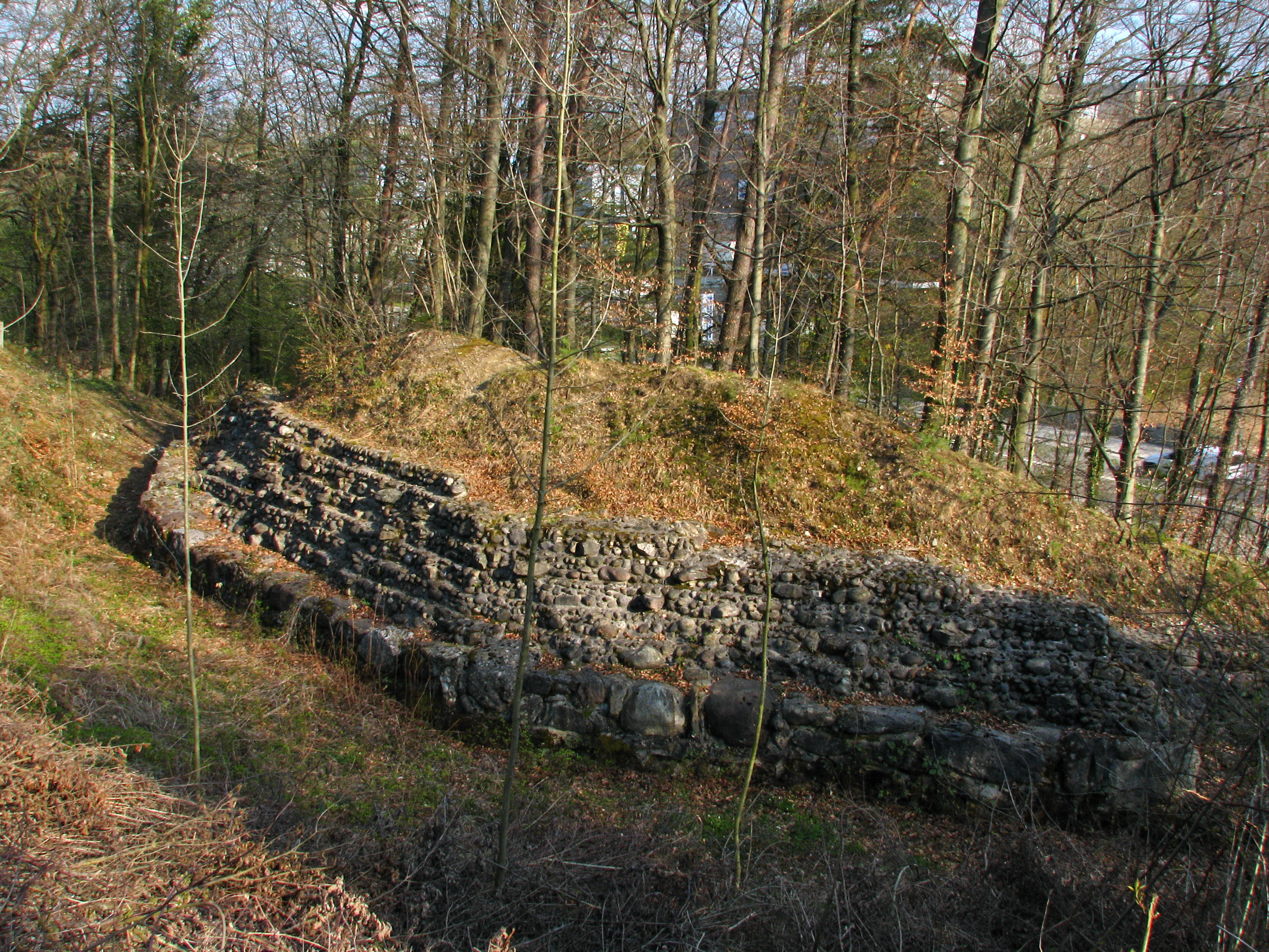 Ruine Glanzenberg in Unterengstringen